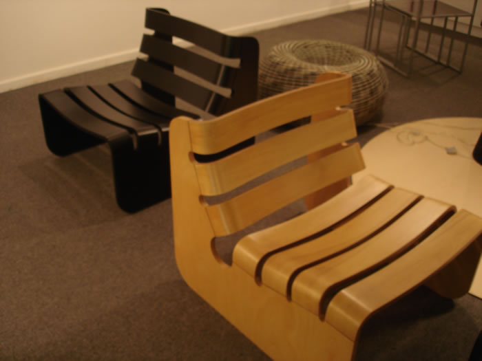 Sillas diseñadas por el diseñador industrial argentino, Ricardo Blanco, expeustas en el Centro Cultural Borges, en Buenos Aires.